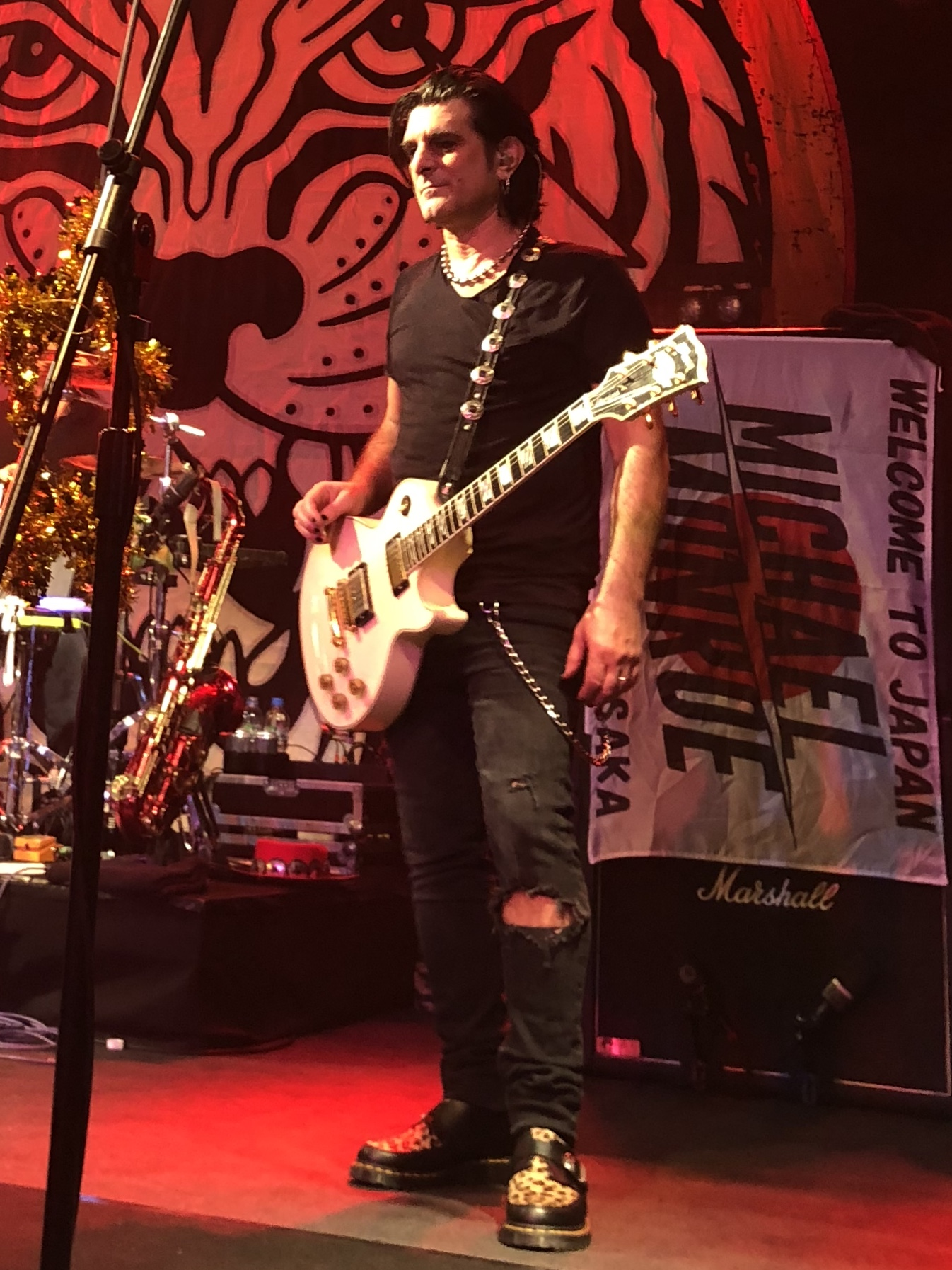 撮影：2019年12月6日 名古屋ダイアモンドホール